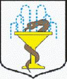 Herb Cieplic Śląskich Zdrój.